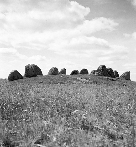 Långdös, RAÄ-nummer Gustav Adolf 4:1. Motiv: Gustav Adolf 4:1 Kategori: Stenkrets/domarring/skeppssättning Långdös, RAÄ-nummer Gustav Adolf 4:1. Gustav Adolf 4:1.